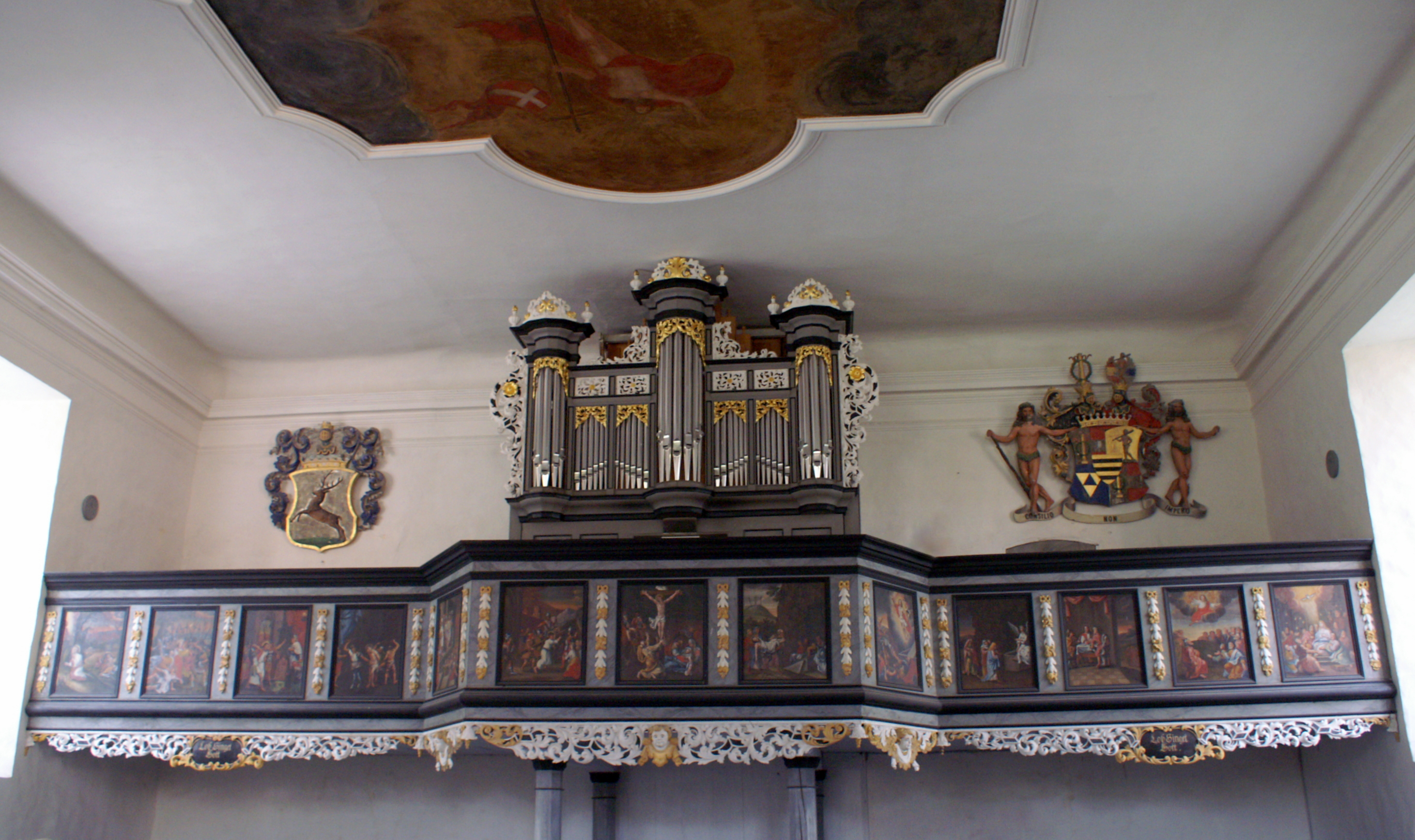 Orgel von Friedrich Albert Mehmel in der St.-Andreas-Kirche zu Nehringen